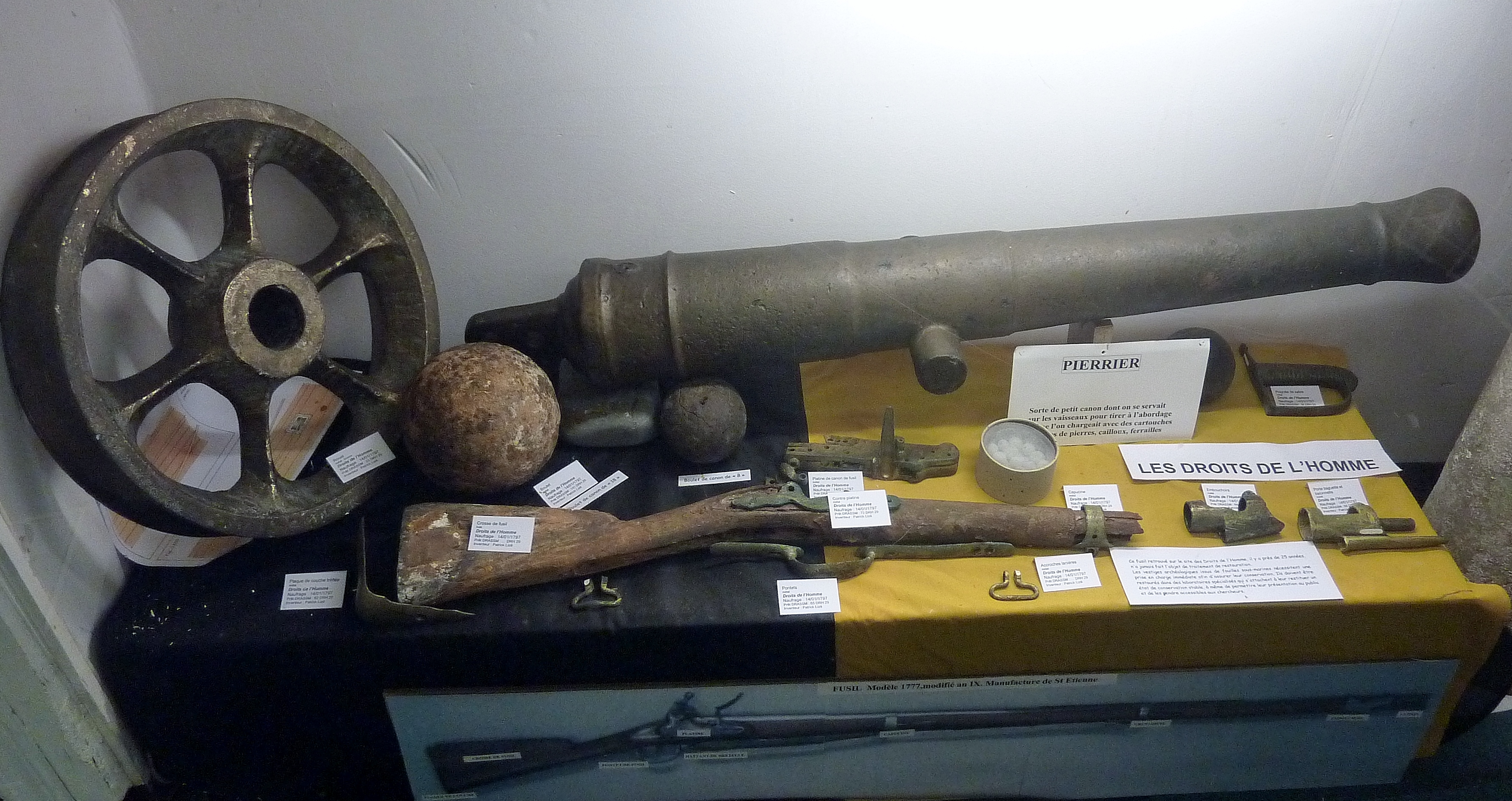 Objets divers provenant des Droits de l'homme, navire naufragé en Baie d'Audierne le 14 janvier 1797 (Musée maritime du Cap-Sizun, DRASSM, inventeur Patrick Lizo).